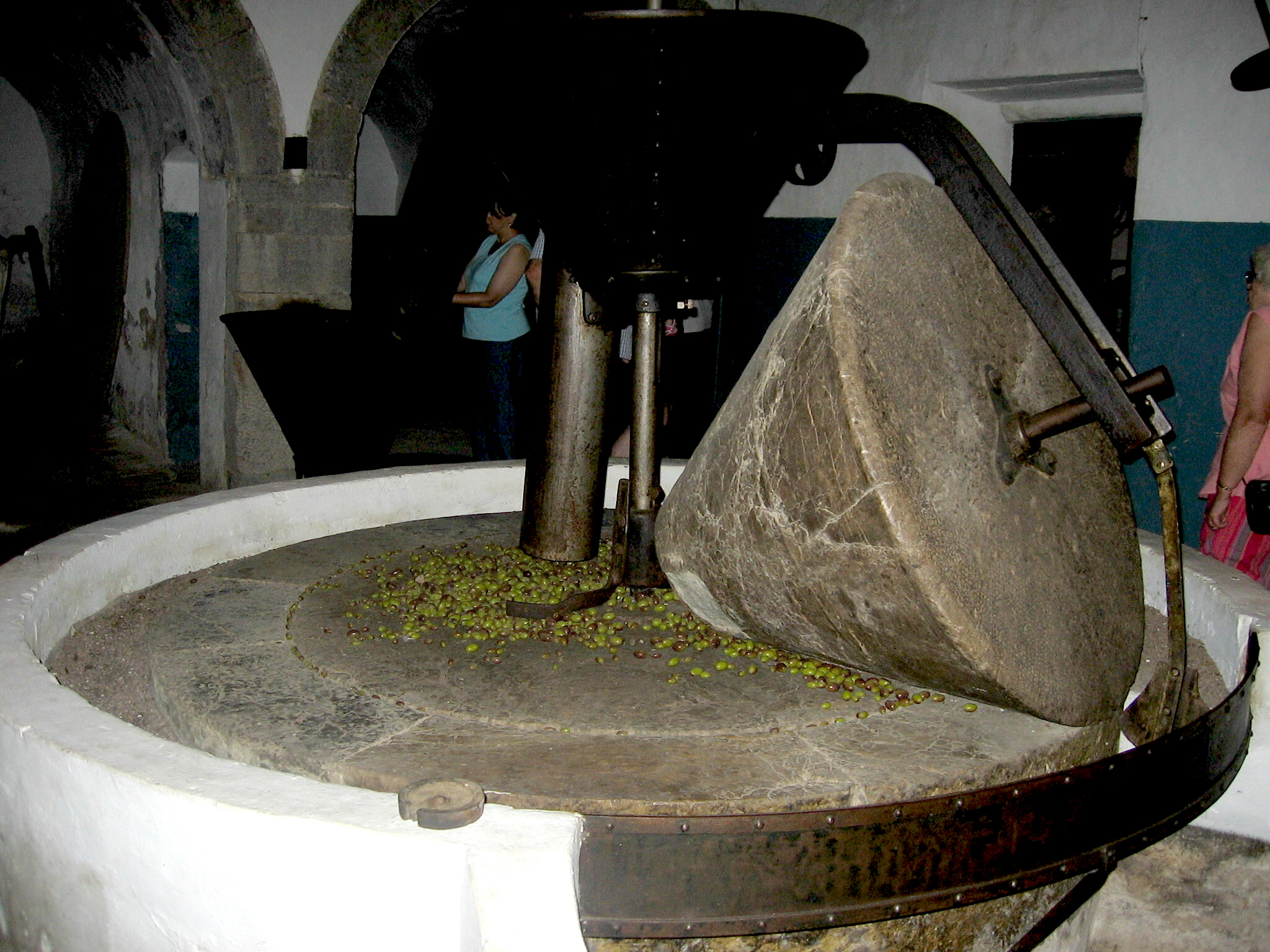 Öölmöhl up ene Finca up Mallorca